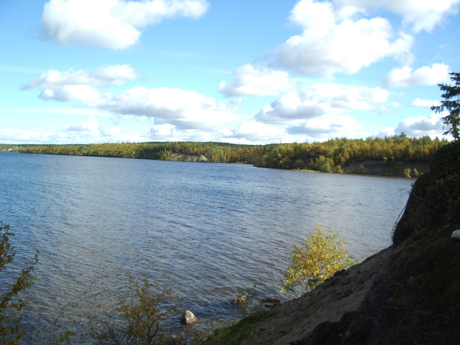 Сухой порог, Тулома